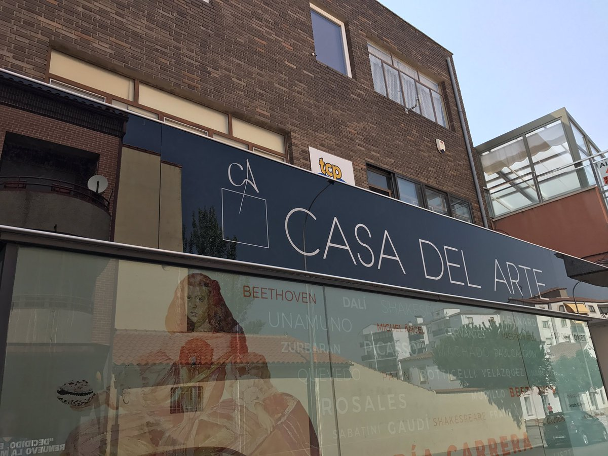 Edificio de la Casa del Arte de Peñaranda de Bracamonte. Centro expositivo de artistas peñarandinos contemporáneos.